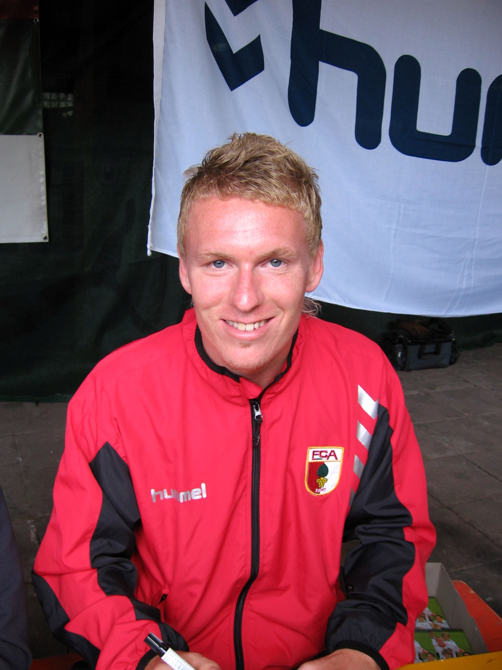 Leonhard Haas